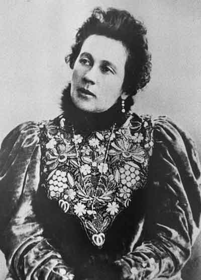 Зинаида Григорьевна Морозова (1867-1947) - жена Саввы Тимофеевича Морозова